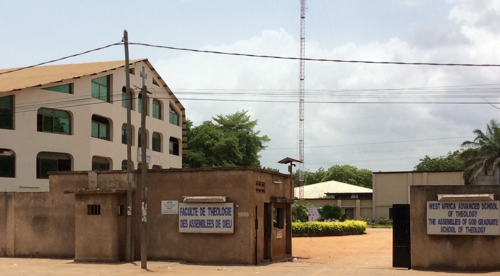 FATAD, Lomé, Togo